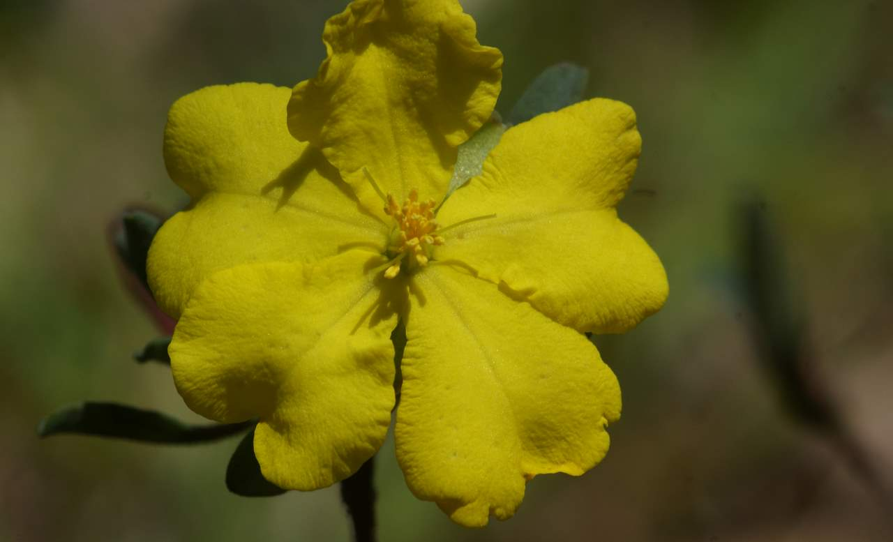 Hibbertia